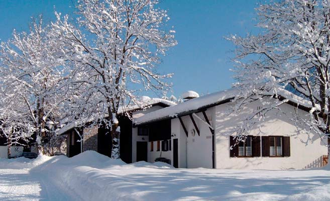 Leonhard-Stimpfle-Haus der Stiftung der Deutschen Polizeigewerkschaft im Dorf Fall (Bayern), Deutschland